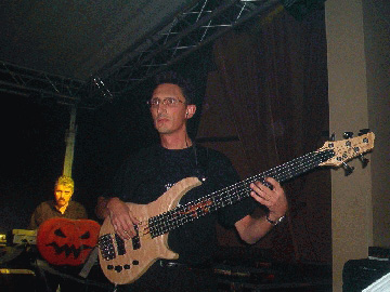 De Bassist Alberto vun der lëtzebuergescher Museksgrupp Crunch the Band.